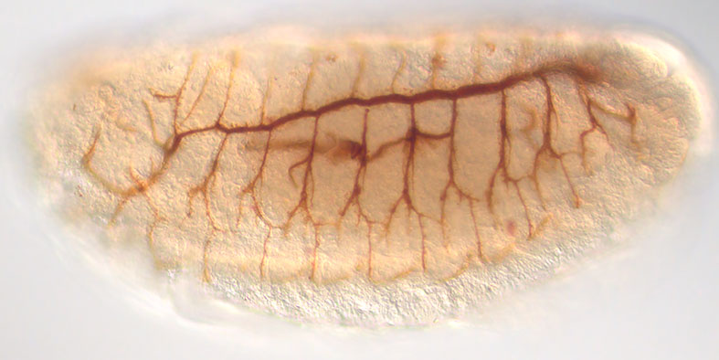 Tracheensystem von Drosophila melanogaster